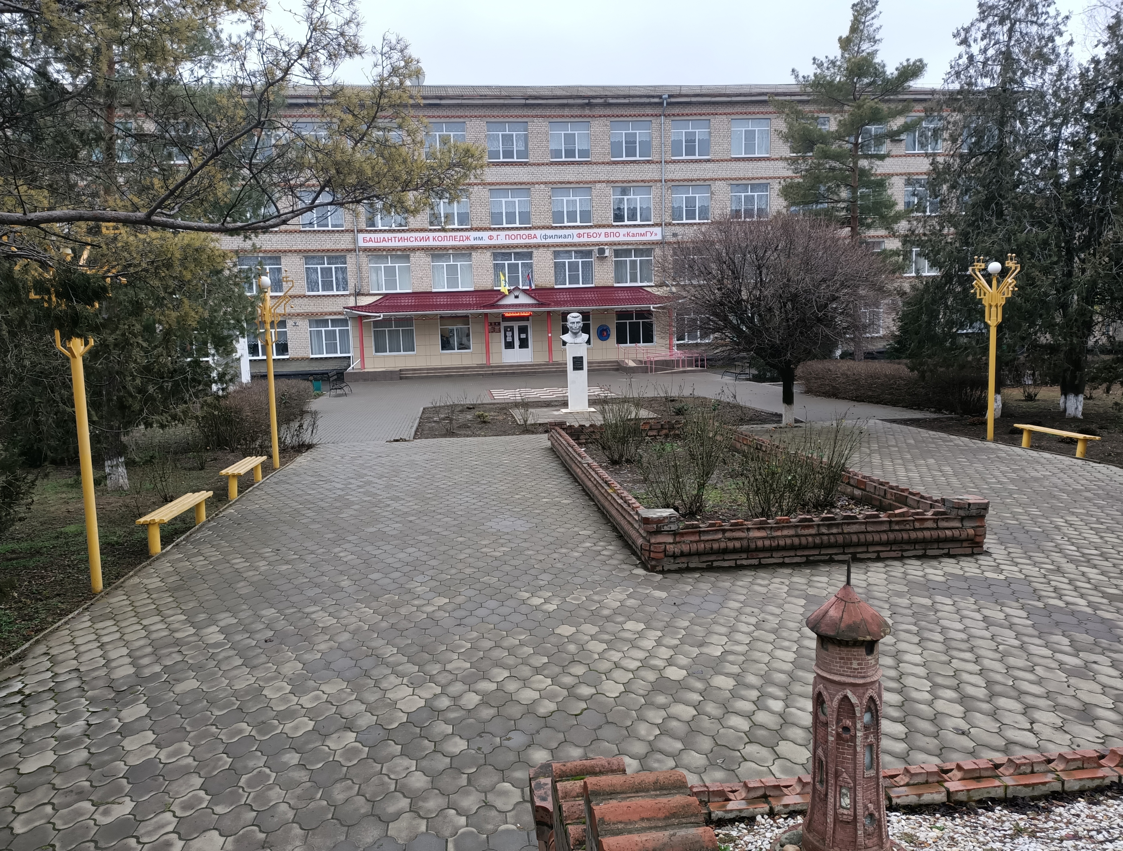 Башантинский колледж им. Ф.Г. Попова Калмыцкого государственного университета имени Б.Б. Городовикова. На фото - главный корпус с прилегающей к нему площадью и сквером, на территории которых расположен памятник герою ВОВ Попову Ф.Г.